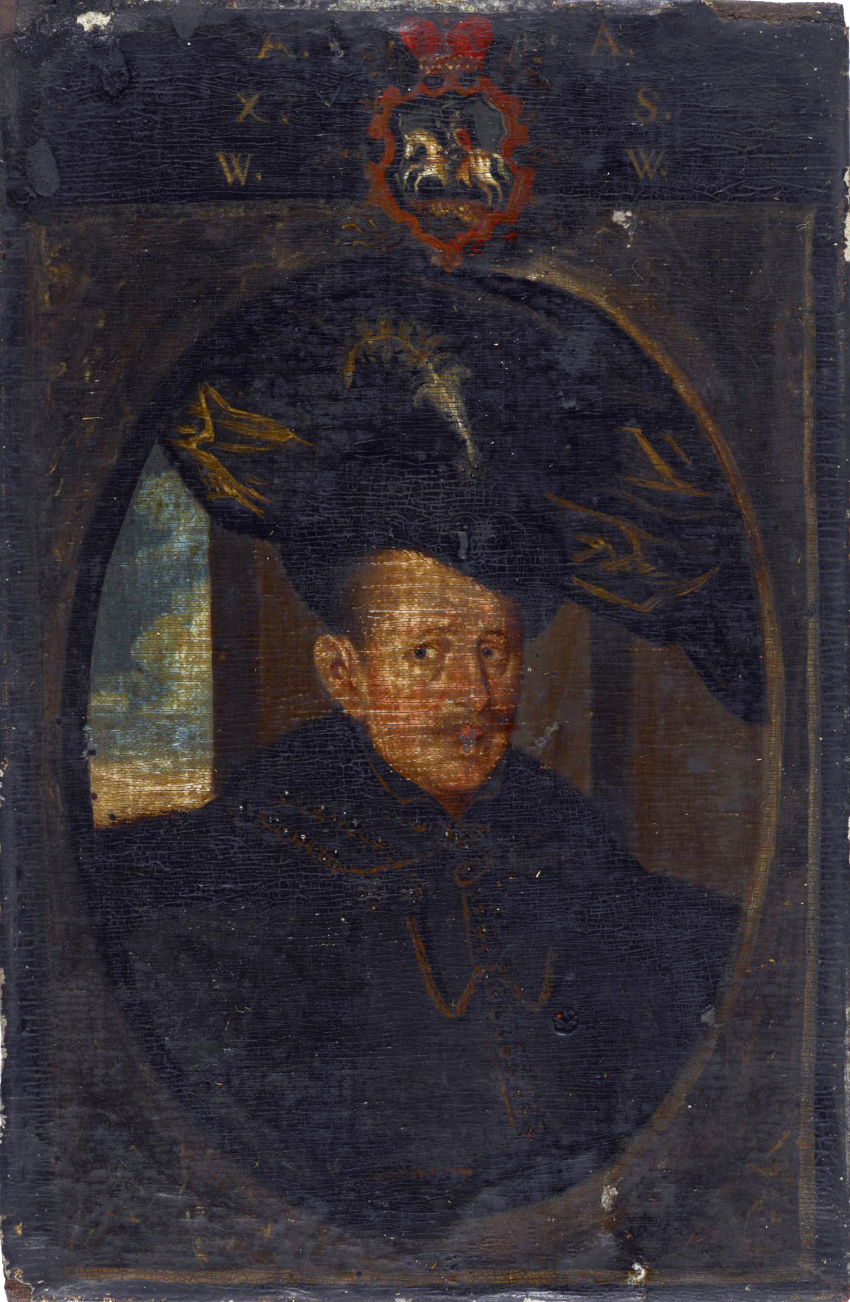 Беларуская (тарашкевіца): Партрэт Рамана Сангушкі (Raman Sanguška)